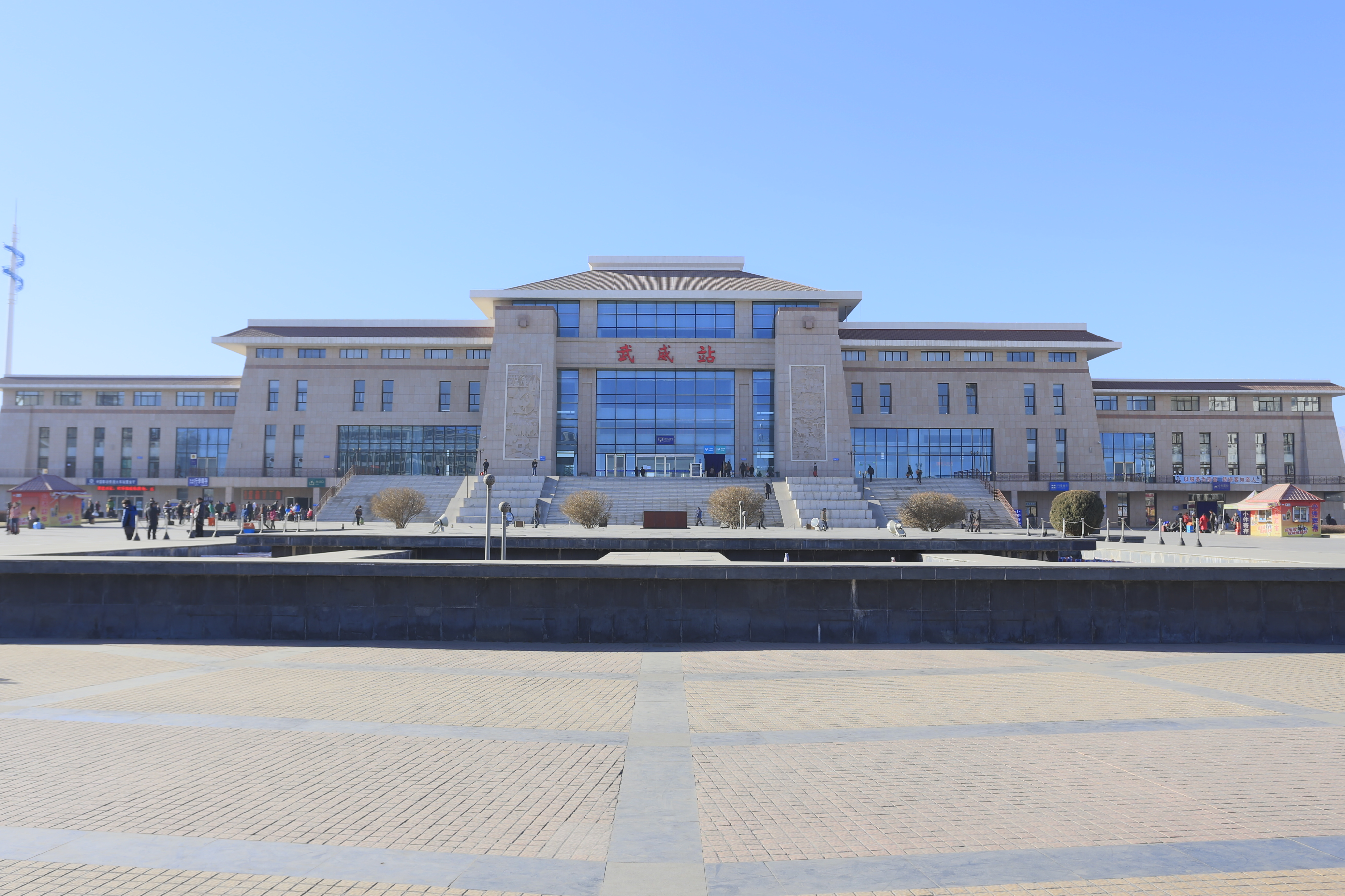 武威站